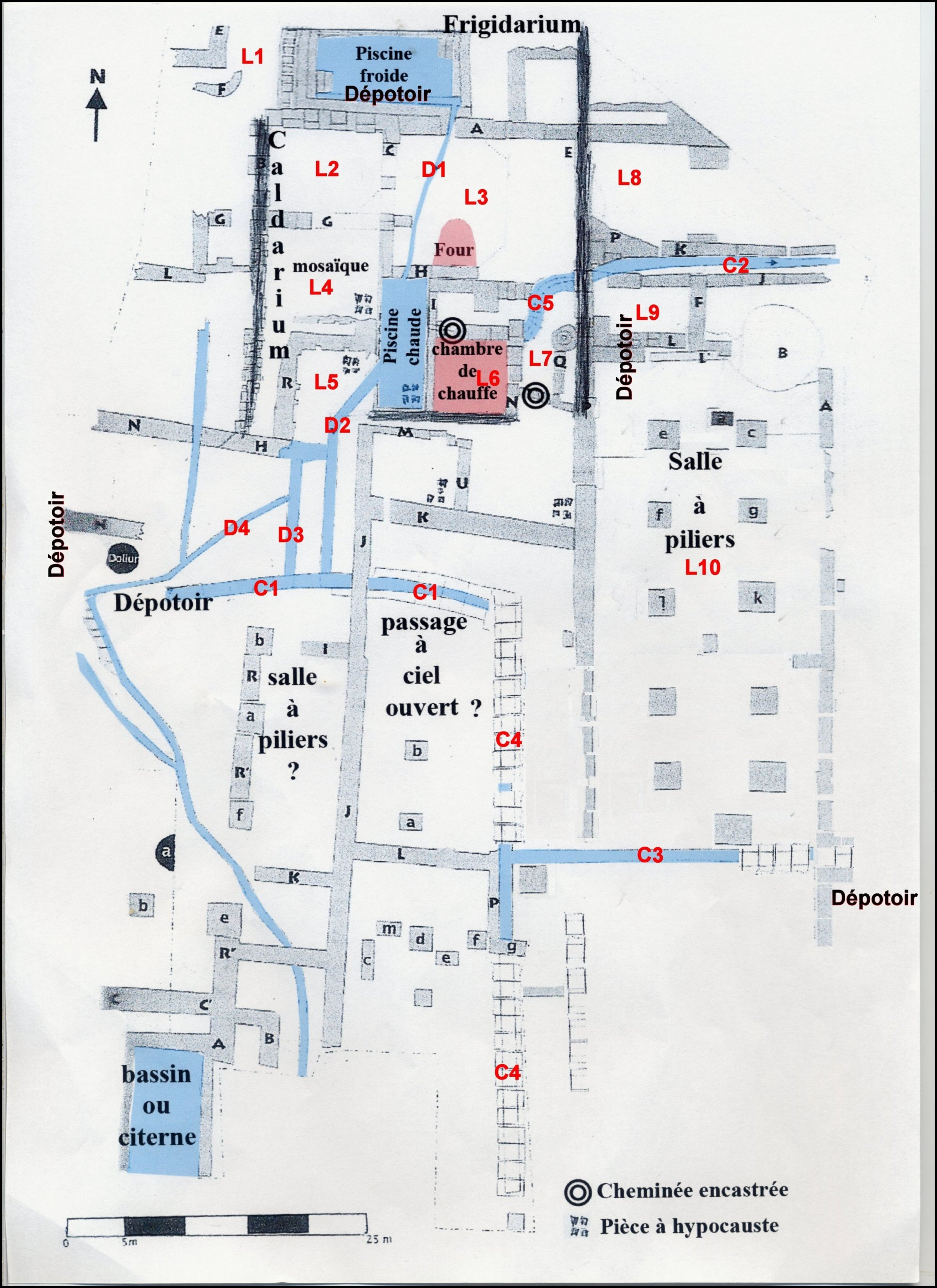 Plan de la villa romaine de Vivios (Lespignan, Hérault, Occitanie) : vue d'ensemble avec la numérotation nouvelle des pièces et des canalisations.